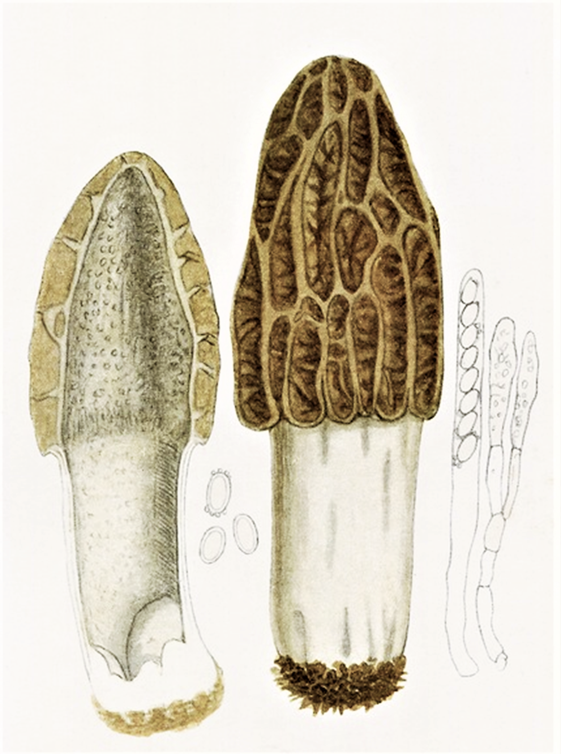 Giacomo Bresadola: Morchella costata (Vent., 1797) Pers. (1801)